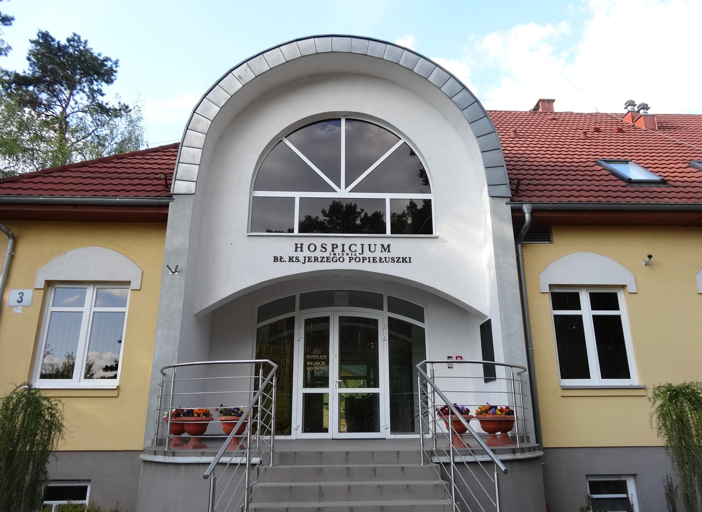 Hospicjum im. ks. Jerzego Popiełuszki w Bydgoszczy przy ul. Szpitalnej 19